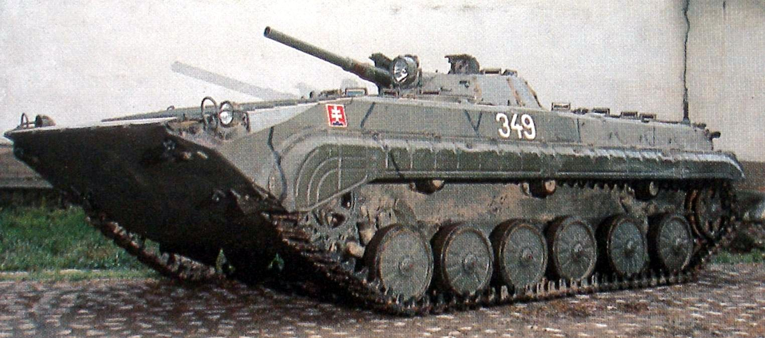 reprodukcia z ročenky Armády SR, bojové vozidlo BVP-1